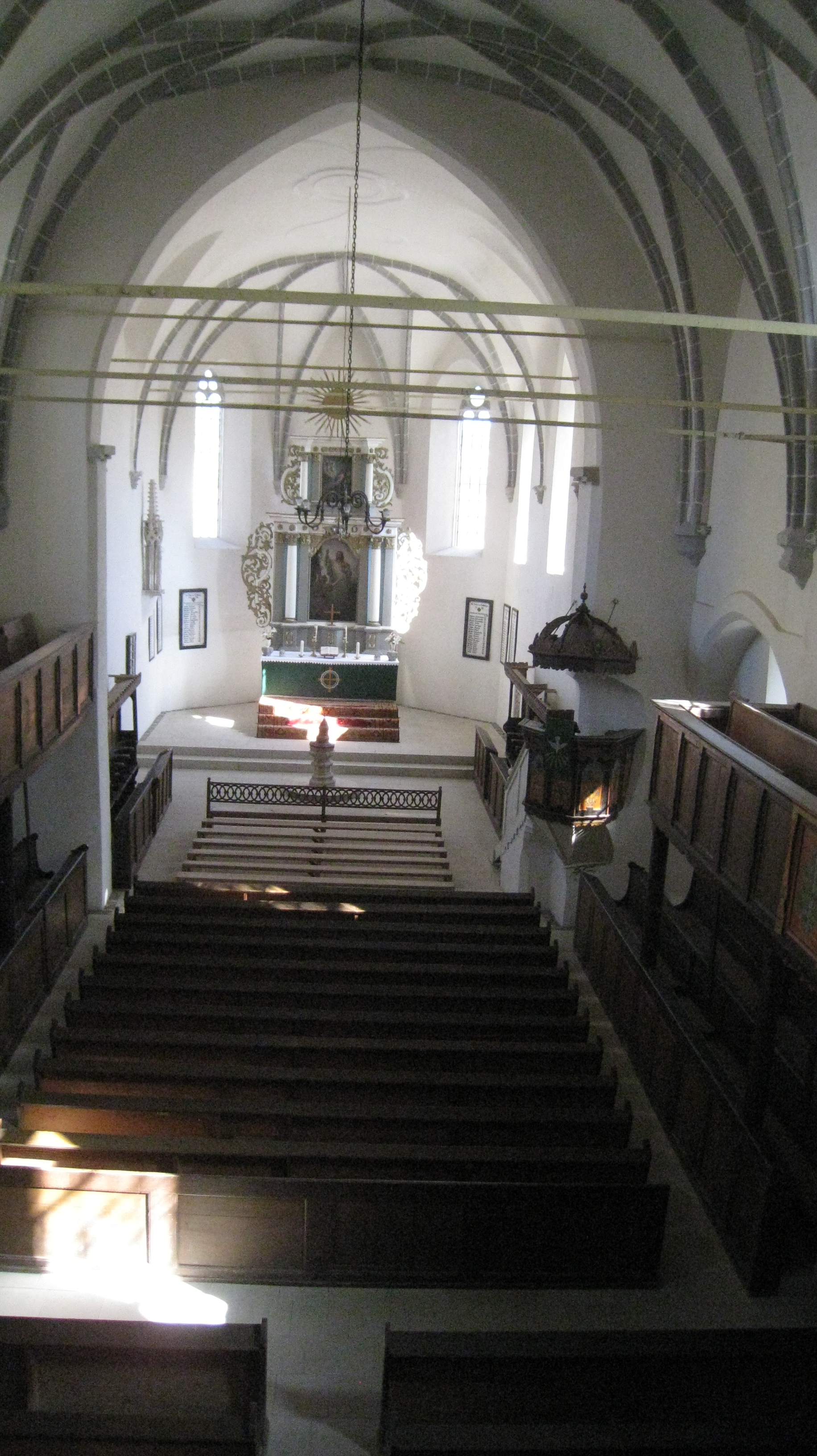 Imaginea este realizata din locul in care este amplasata orga